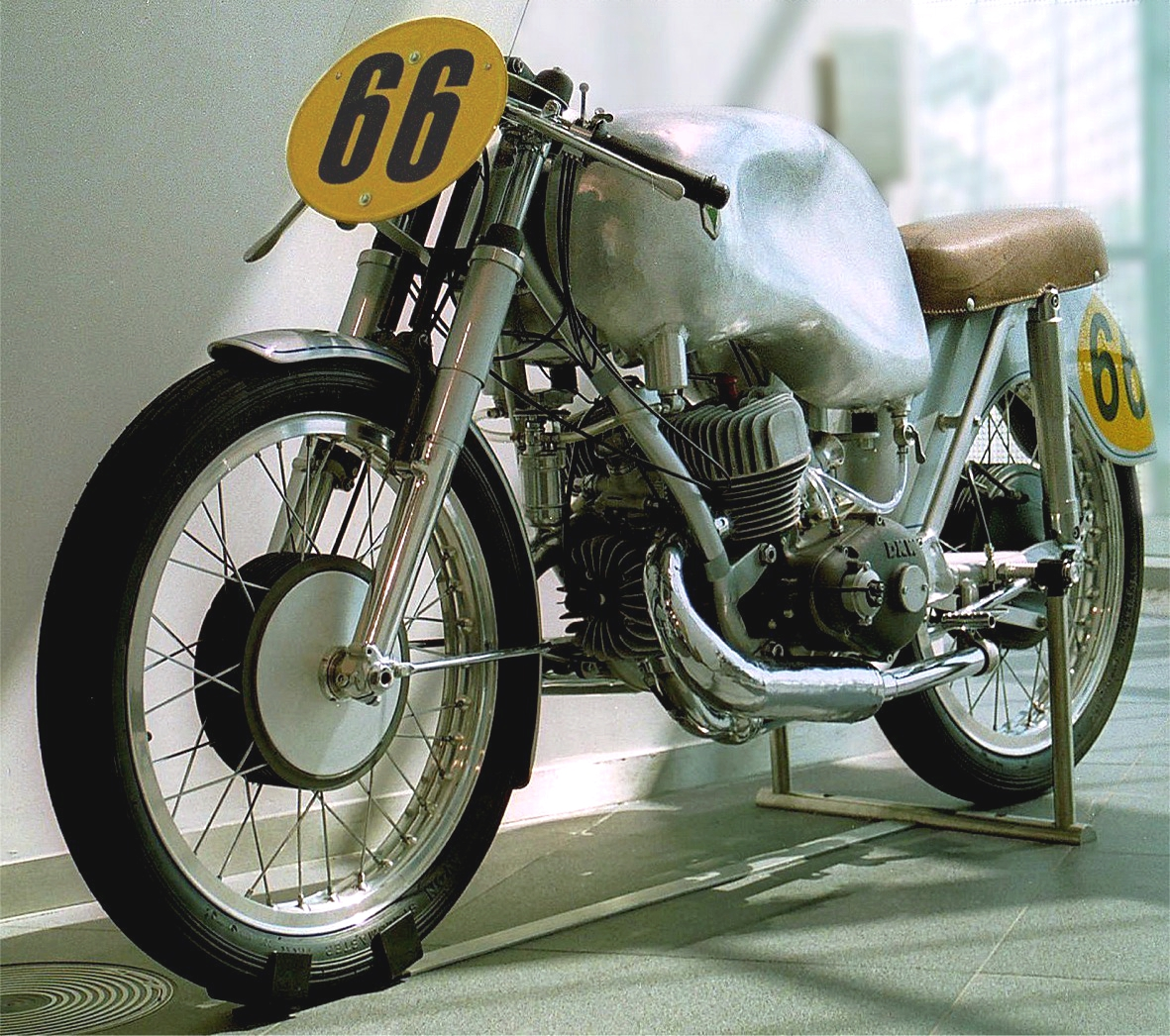 DKW RM 350, Baujahr 1953, im museum mobile in Ingolstadt. 3-Zylinder-Zweitaktmotor, 350 cm³, 38 PS bei 12.000/min, Höchstgeschwindigkeit 190 km/h. Im Einsatz von 1952 bis 1956. Bekannt als „Singende Säge“